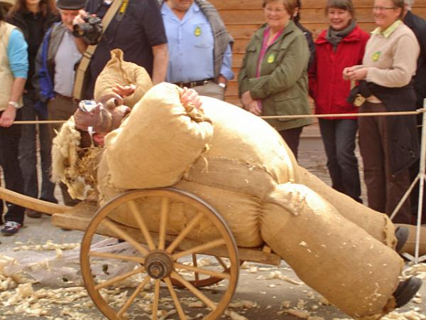 Straumuni